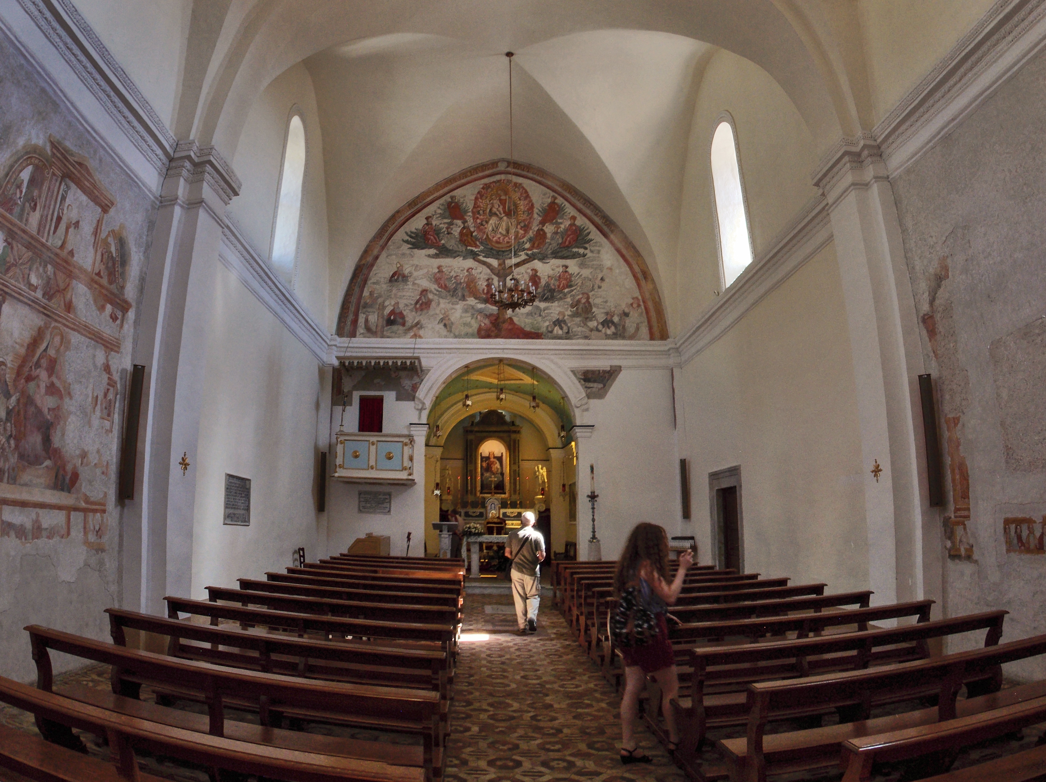 Il santuario della Madonna del Taburno a Bucciano (BN)